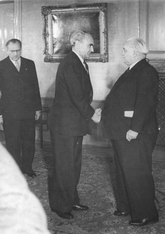 Illus/Heilig 16.11.50 Präsident Pieck empfing die neue Regierung. Am 13.11.50 empfing Präsident Pieck in seinem Amtssitz in Berlin-Niederschönhausen die neugebildete Regierung der DDR. Ministerpräsident Grotewohl stellte dem Präsidenten die neuen Regierungsmitglieder vor. UBz: Der Stellv. Ministerpräsident und Vorsitzender der Staatlichen Plankommission, Heinrich Rau, wird vereidigt.